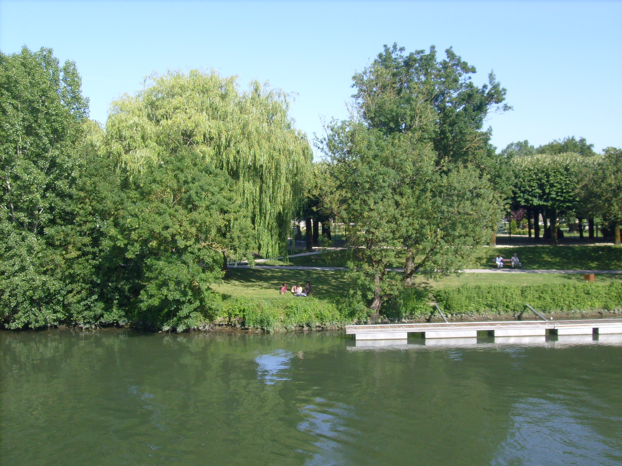 Vue sur le jardin public de Saintes